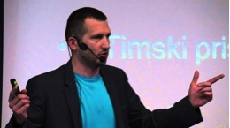 Damir Črnceč about